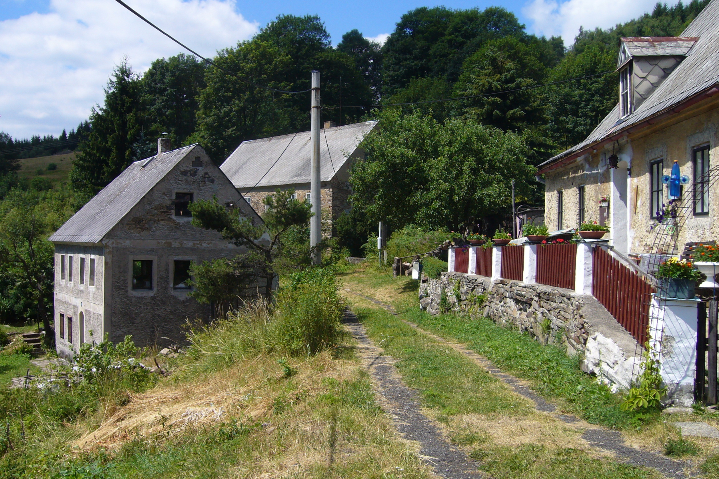 Kamenné - pohled od východu